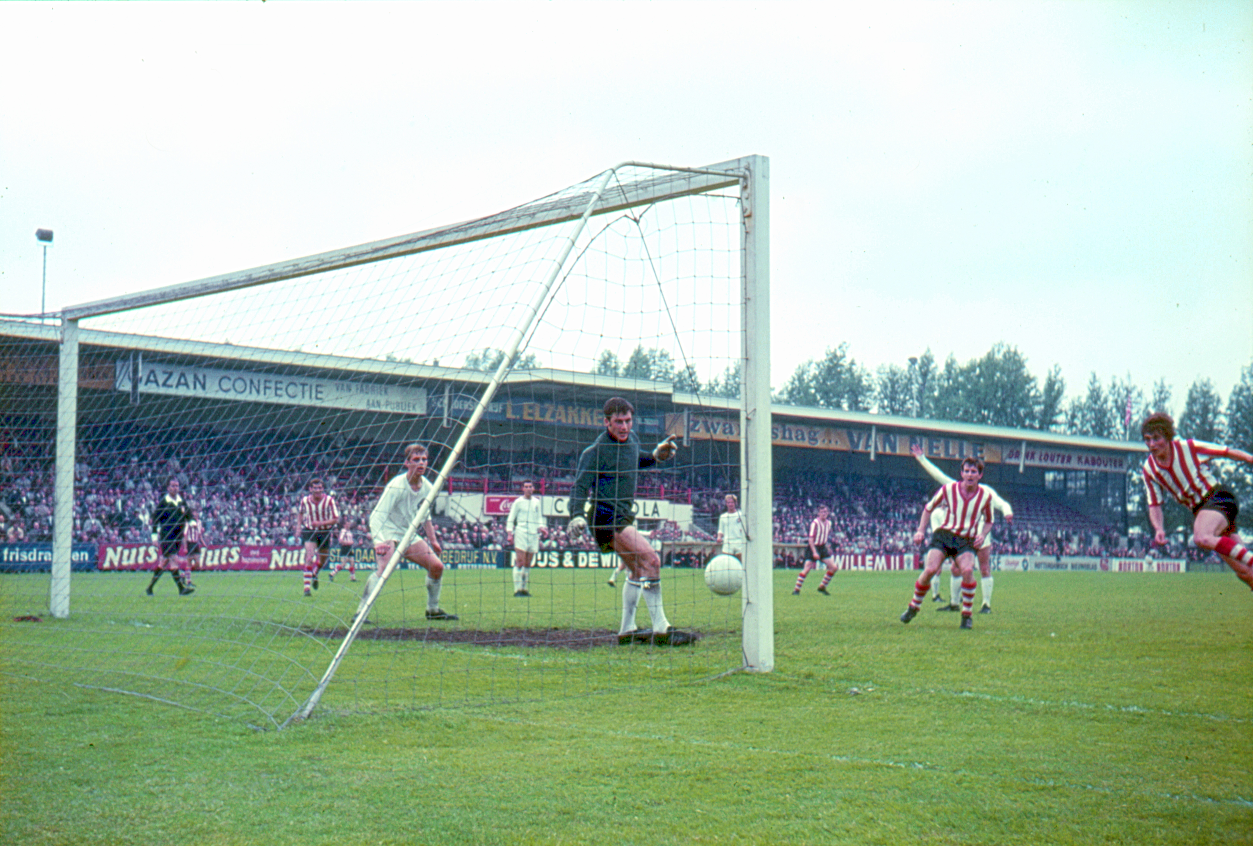 Sparta scoort een doelpunt in de thuiswedstrijd tegen Telstar, op 6 oktober 1968. Telstar spelend met o.a. Monne de Wit.